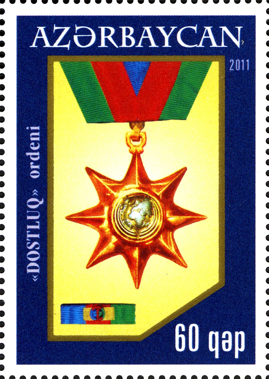 Azərbaycan Respublikasının Ordenləri.